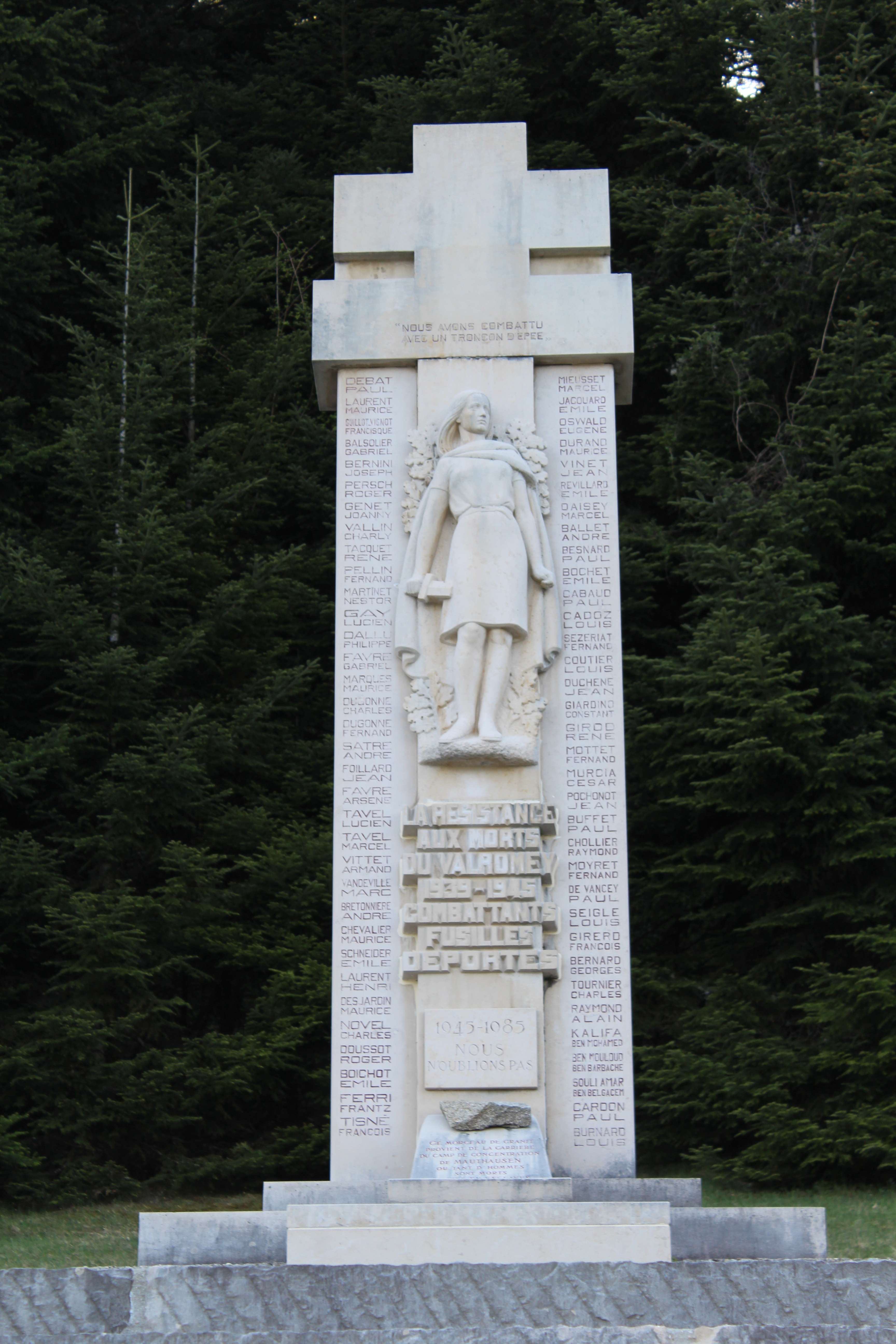 Monument aux morts de la Résitance du Valromey, Belmont-Luthézieu.